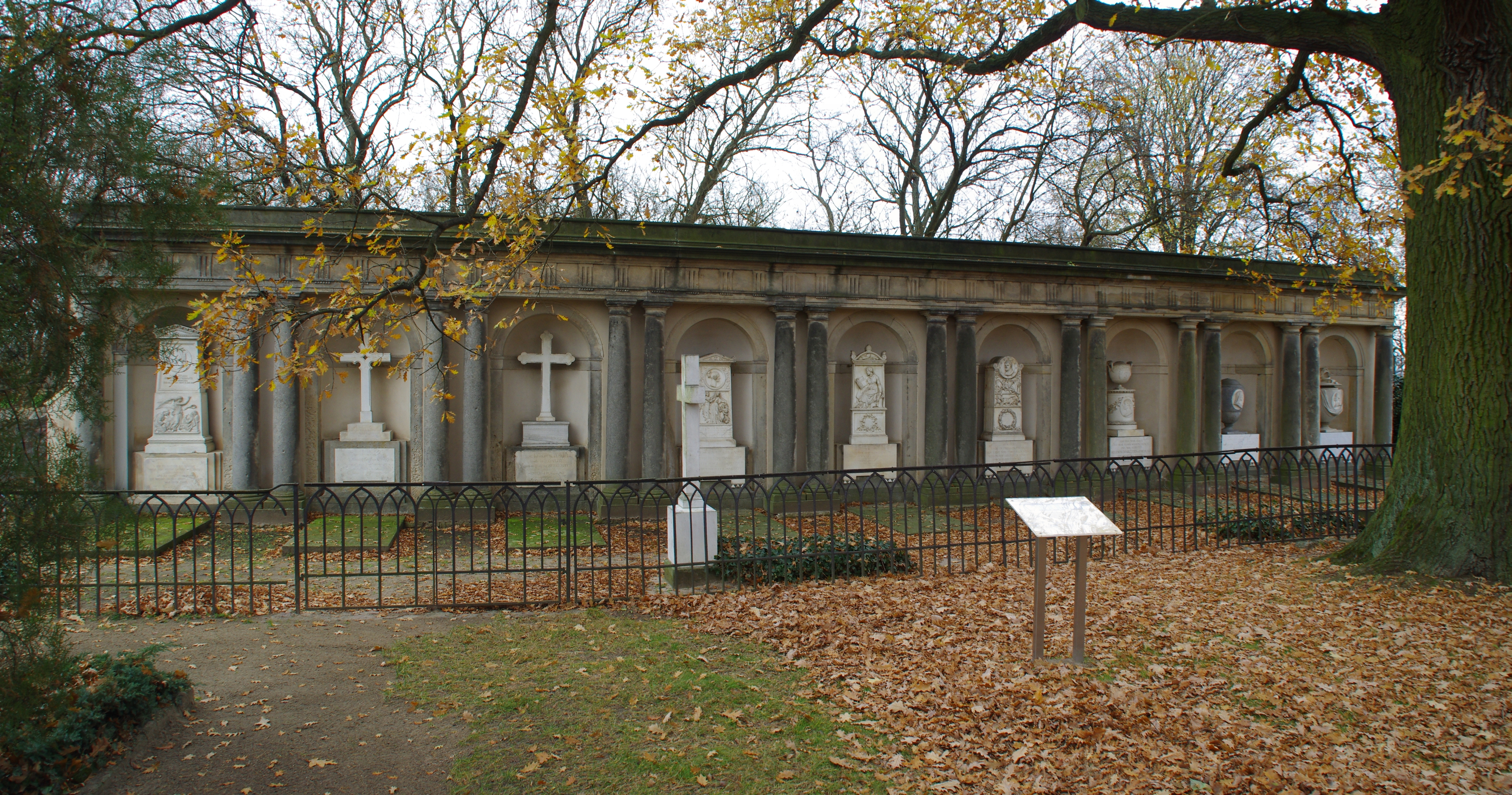 Bliesdorf, Ortsteil Kunersdorf in Brandenburg. Das Erbbegräbnis der Familie von Lestwitz-Itzenplitz befindet sich auf dem Friedhof der Kirche von Kunersdorf. Die Grabkolonaden sind denkmalgeschützt.